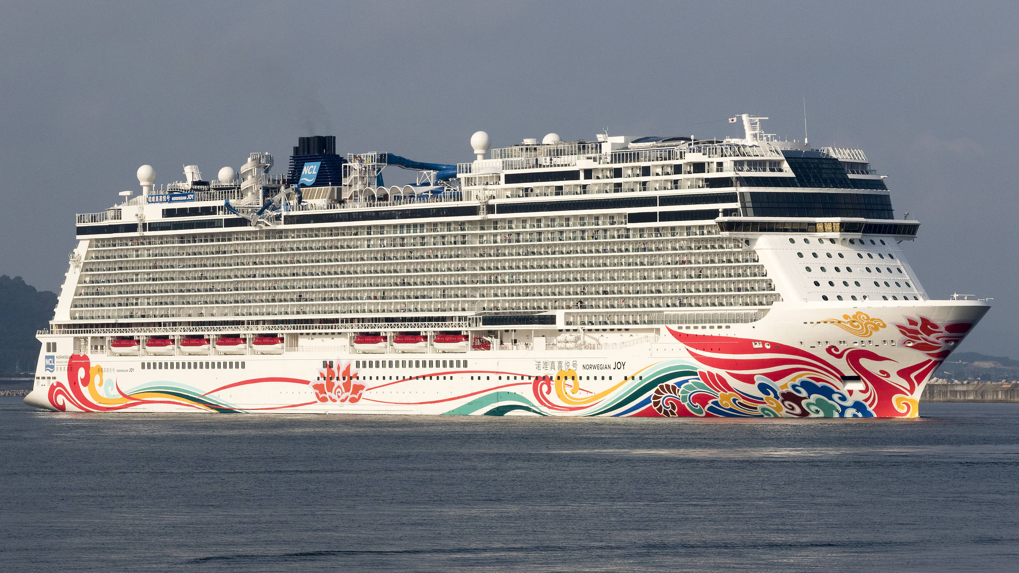 ノルウェージャン・ジョイ 高知新港にて